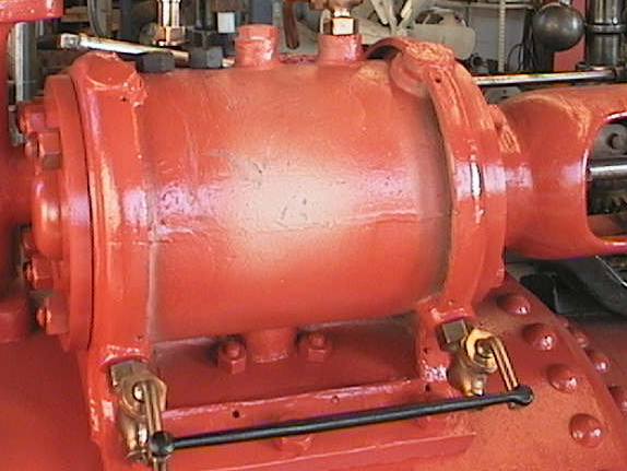 Hikiventtiilit paikallishöyrykoneessa